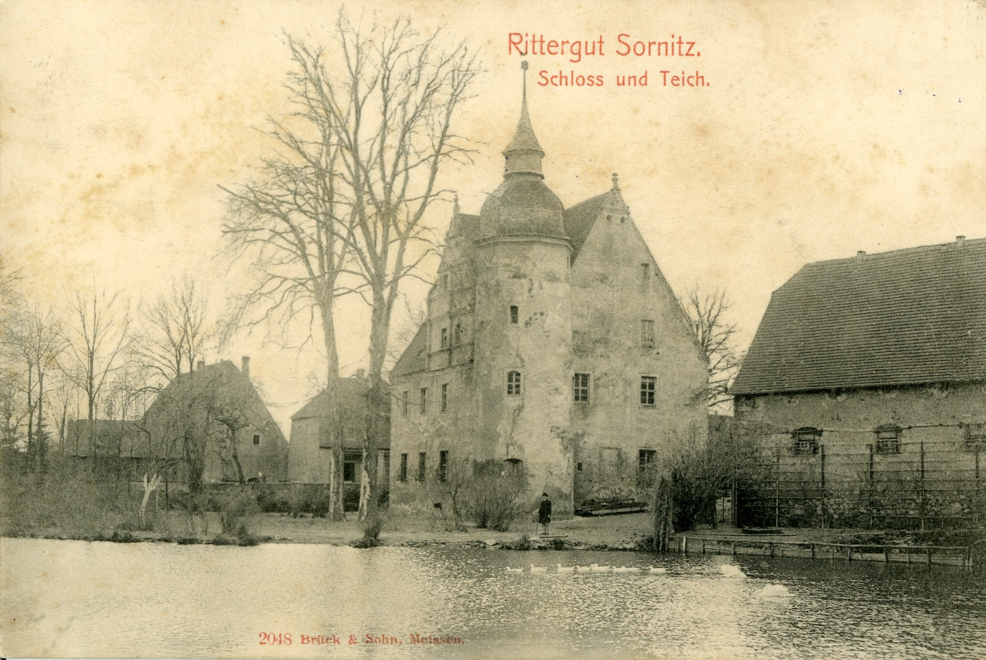 Sornitz; Schloß und Teich This postcard is from publisher Brück & Sohn in Meißen ( postcard has a unique number 02048 and is available in a higher resolution at the publisher. This images was uploaded in a cooperation project between Wikipedians and the publisher.